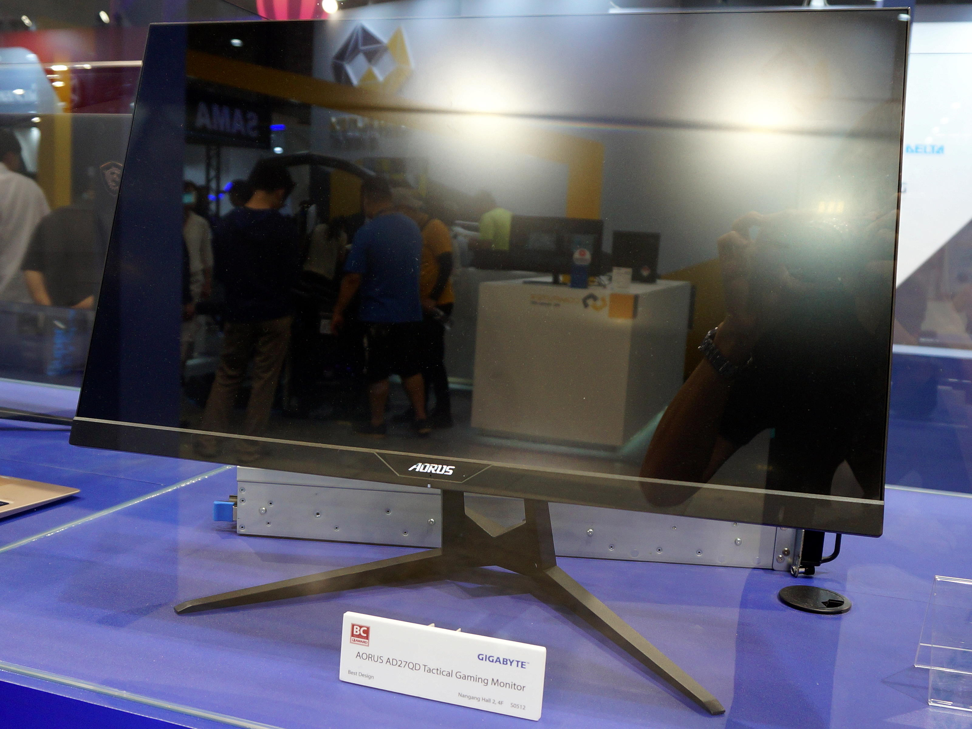 2019台北國際電腦展，技嘉科技27吋QHD面板16:9電競顯示器AORUS AD27QD。